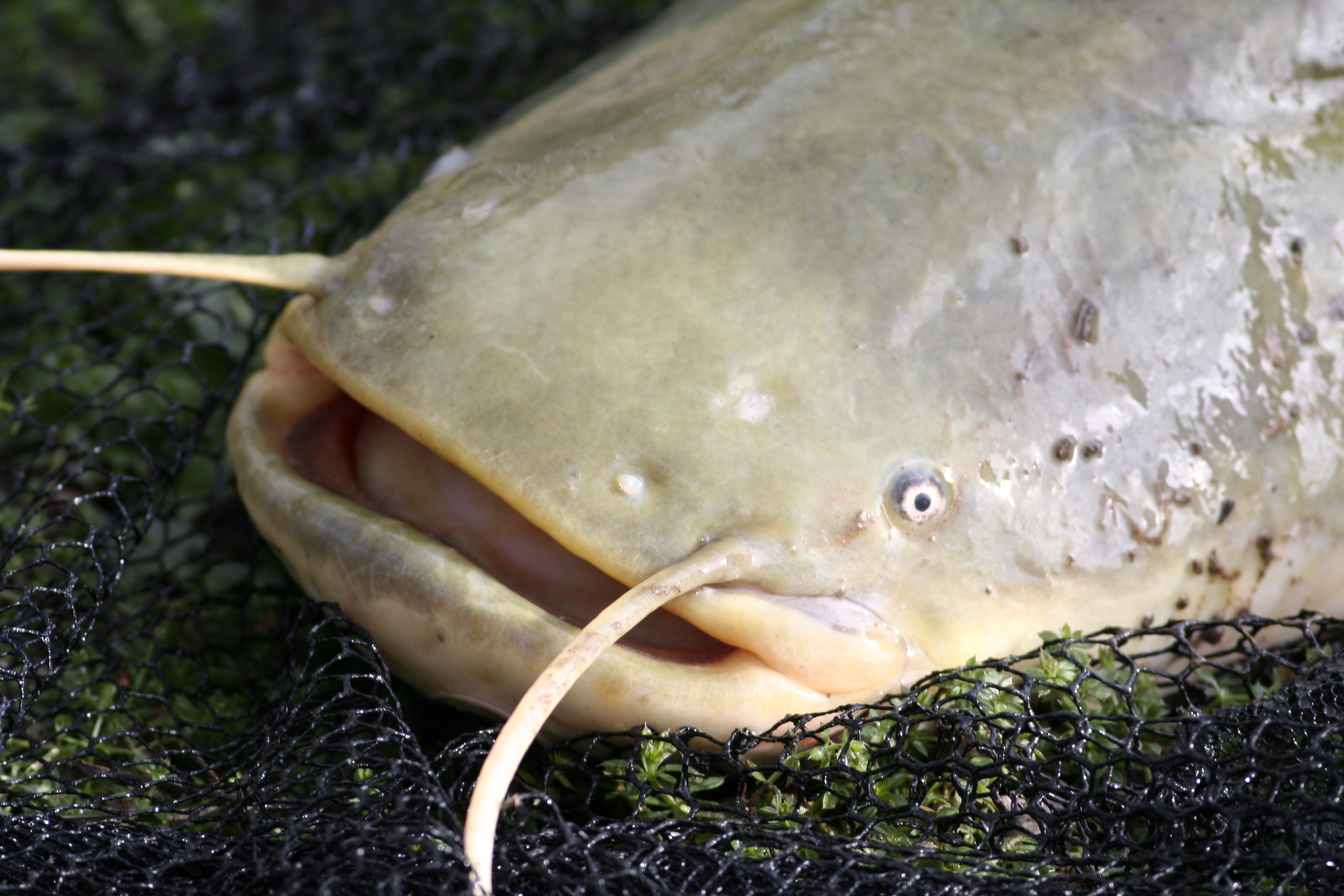 silure